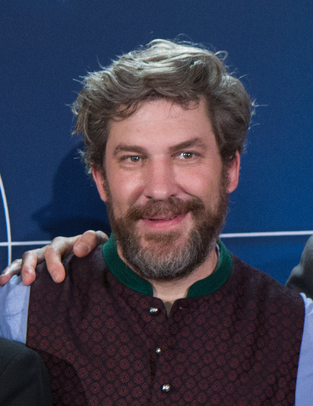 Fotocall im Rahmen der Preview des Tatorts „Der wüste Gobi“ u.a. mit Nora Tschirner.